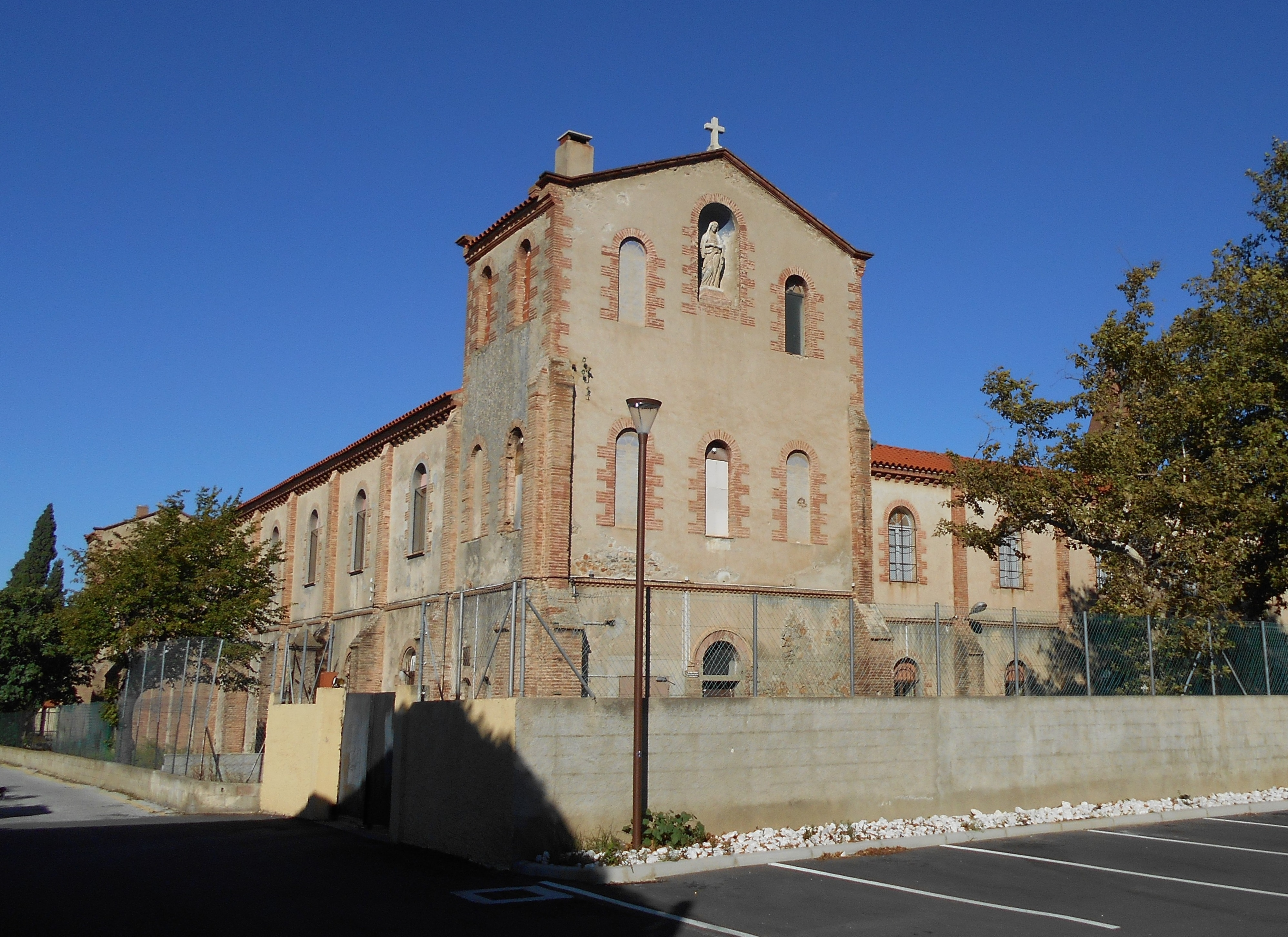 Convent de Nostra Senyora dels Àngels d'Espirà de l'Aglí